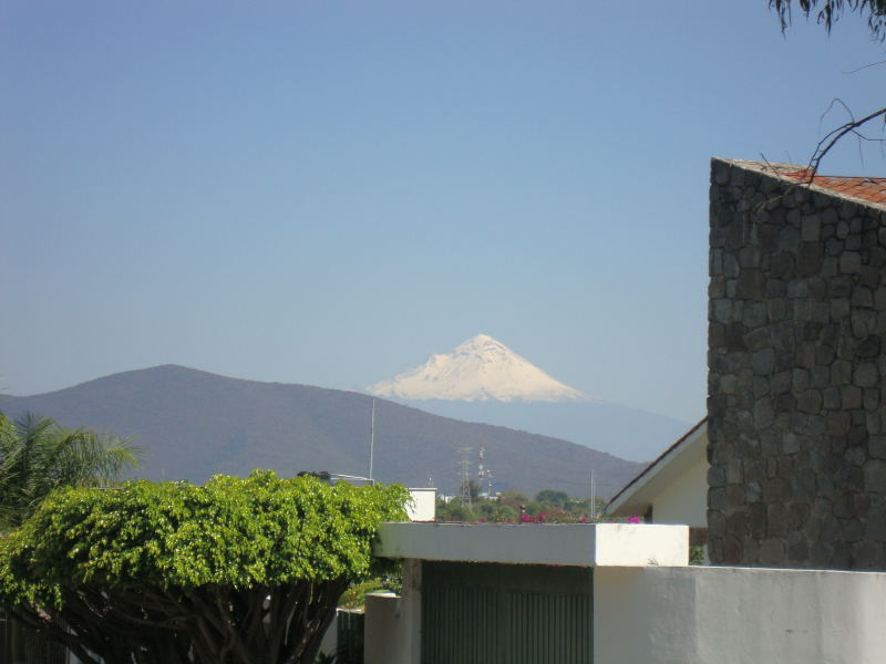 Fotografía del Popocatepetl en invierno de 2010 desde el municipio de Jiutepec, Morelos, México